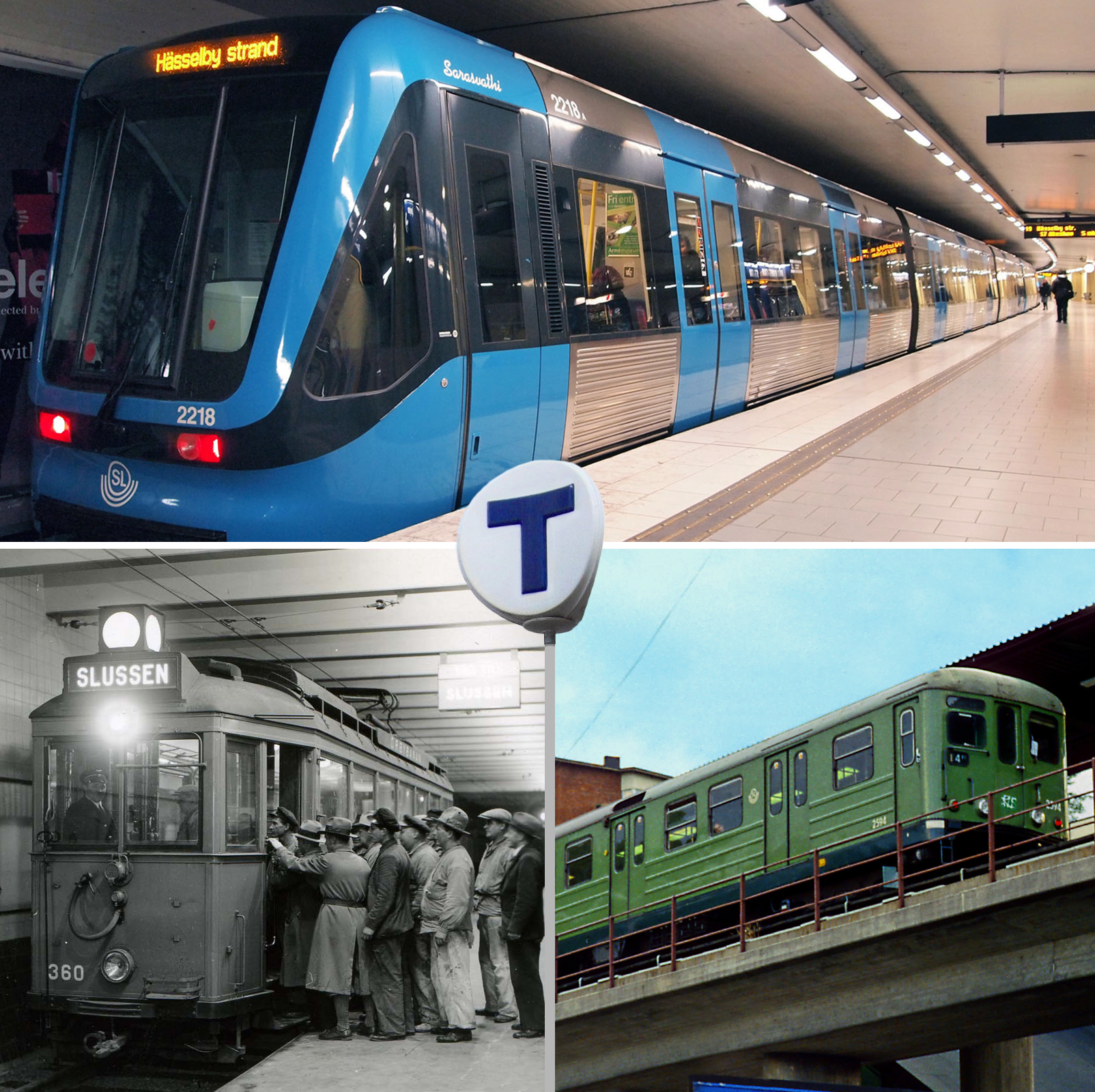 Ett kollage av bilder från Stockholms tunnelbana, skapad av Albin Olsson fritt efter Stockholms tunnelbana kollage a.jpg av user:Holger.Ellgaard.